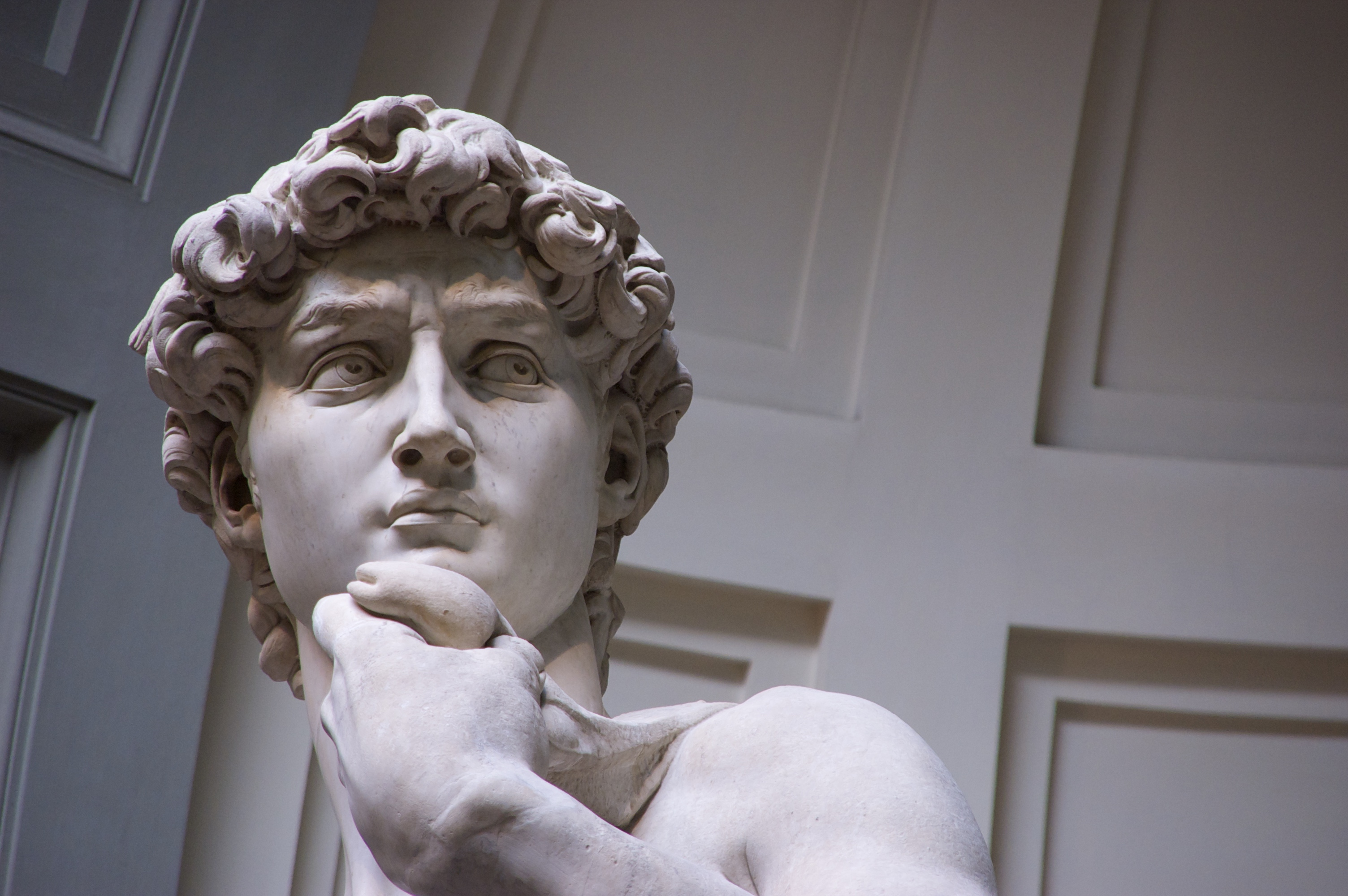 David de Michel-Ange (détail tête)